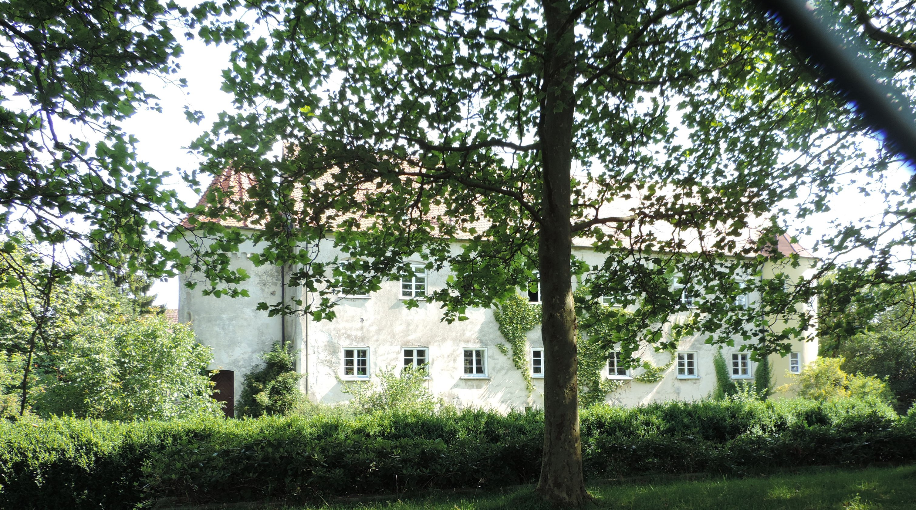 Südfront Schloss Eglingen